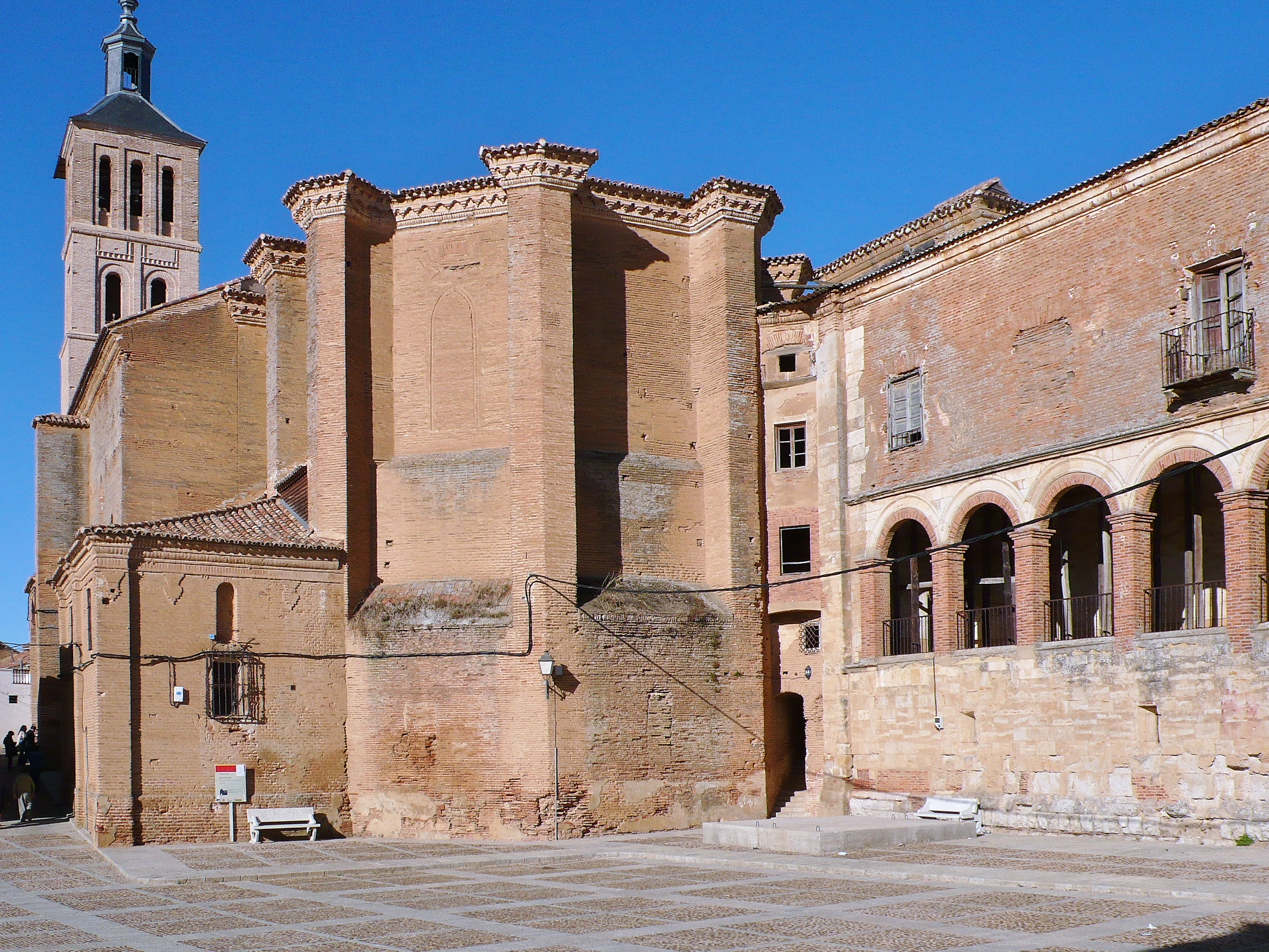 A la derecha, logia del palacio de Hernando de la Vega (1552-1556).- Iglesia se San Miguel Arcangel (1516)